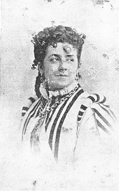 Auteur du cliché : André-Adolphe Disdéri (1819-1890), photographe